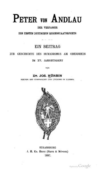 Peter von Andlau. Der Verfasser des ersten deutschen Reichsstaatsrechts. Titel der Ausgabe von Josef Hürbin